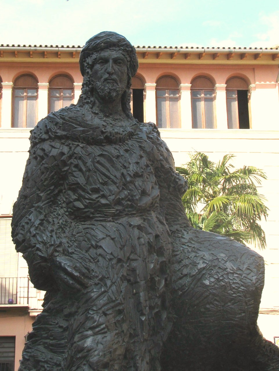 Monumento en memoria de Ibn Tumlús, en Alcira.